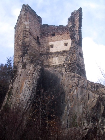 Ruine Haldenstein, Gemeinde Haldenstein, Kanton Graubünden, Schweiz